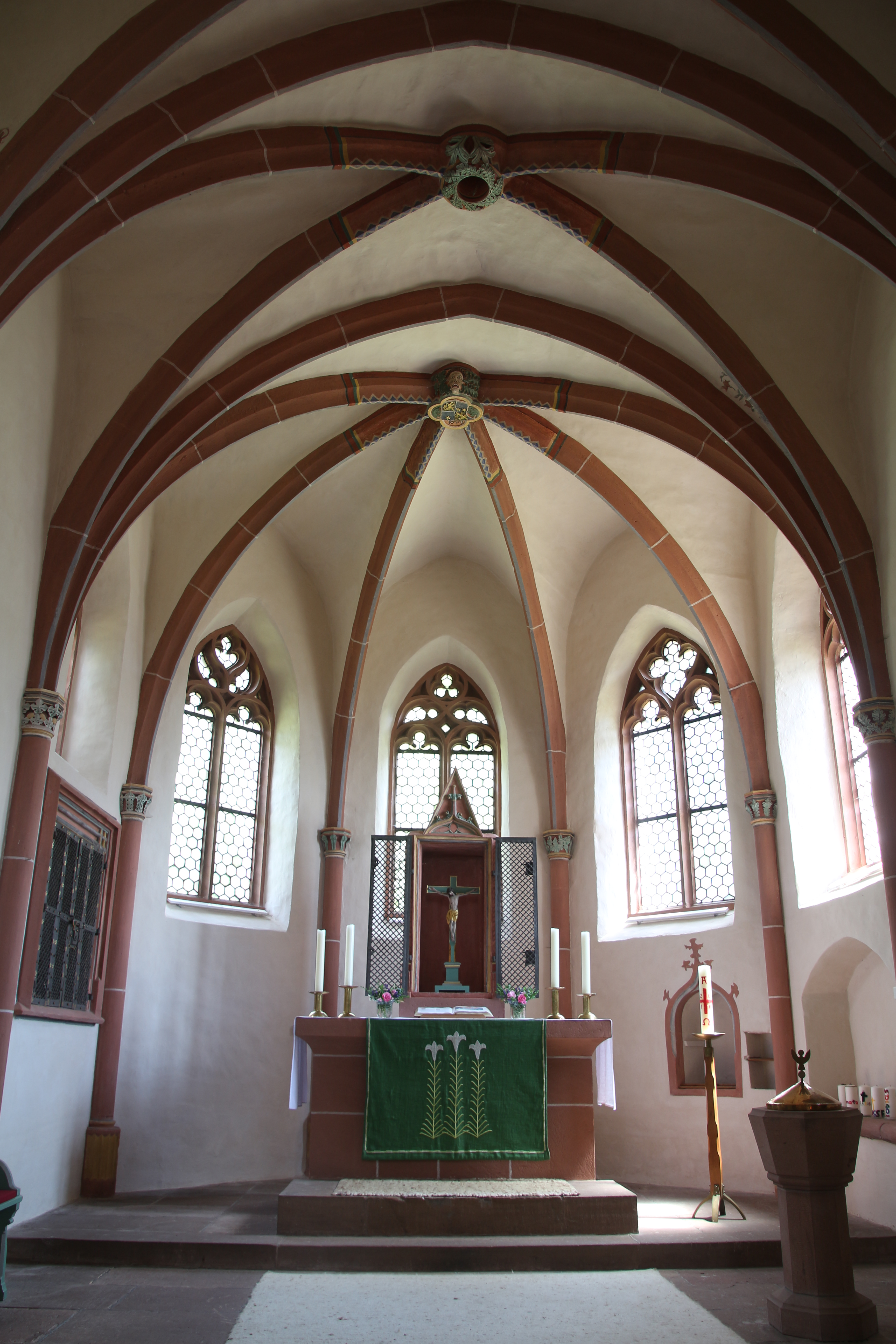 Siehe Bild und Dateiname